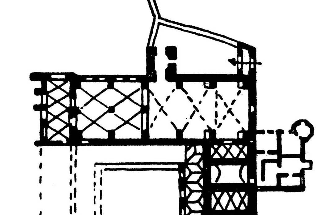 Grundriss der ehemaligen Klosterkirche St. Ulrich in Urspring